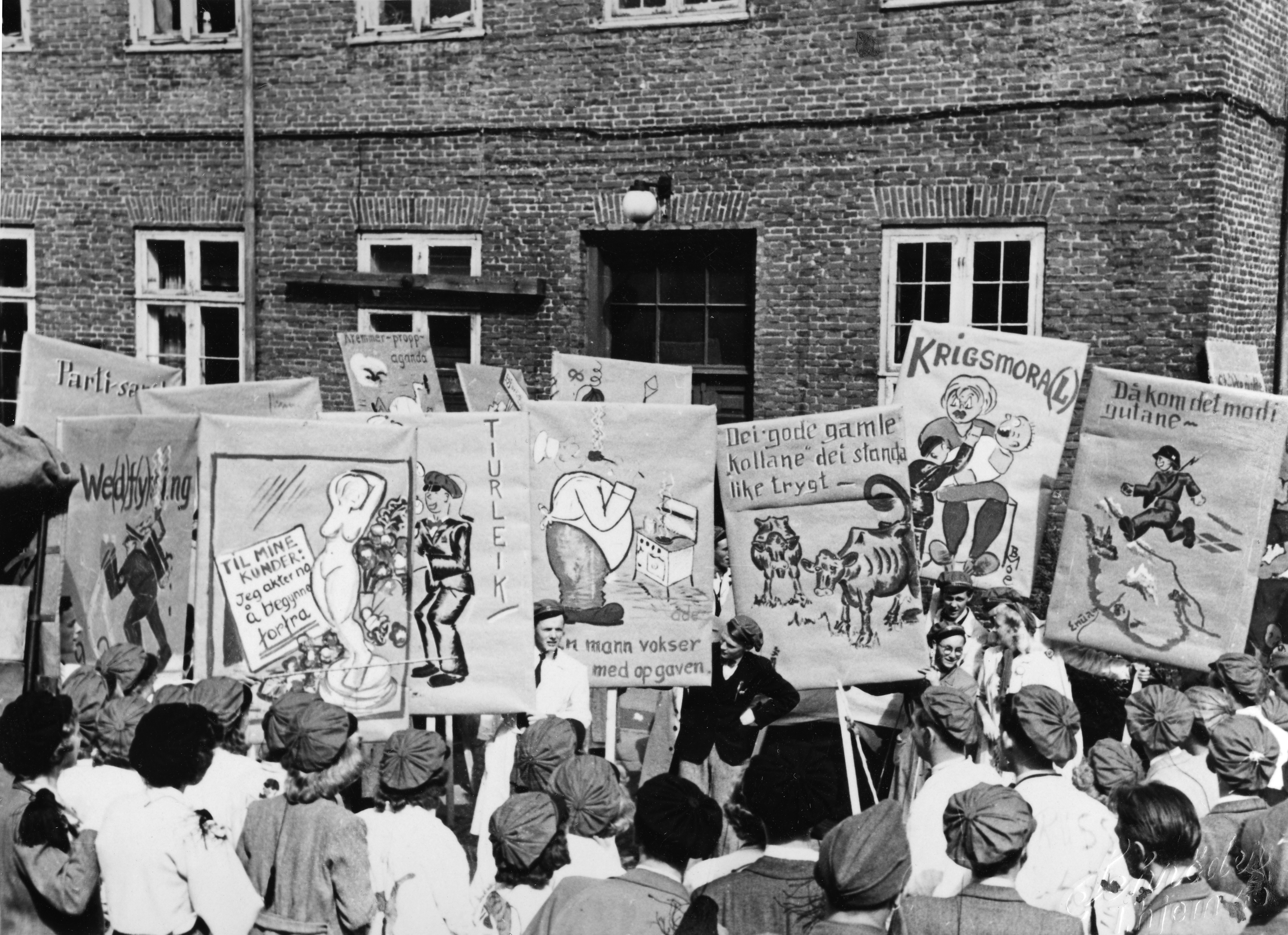 Format: Fotopositiv Dato / Date: 17. mai 1945 Fotograf / Photographer: Mulig Schrøder eller Trygve Gjervan (1918 - 2004) Sted / Place: Katedralskolen, Trondheim Wikipedia: Trondheim katedralskole Wikipedia: Russefeiring Wikipedia: Russefeiring (eng) Eier / Owner Institution: Trondheim byarkiv, The Municipal Archives of Trondheim Arkivreferanse / Archive reference: Tor.H42.B53.F23875 Merknad: Fra Trygve Gjervans privatarkiv. "Dei gode gamle kollane dei standa like trygt" og "Då kom det mod i gutane" refererer til dikt av Ivar Aasen (1813 - 1896).